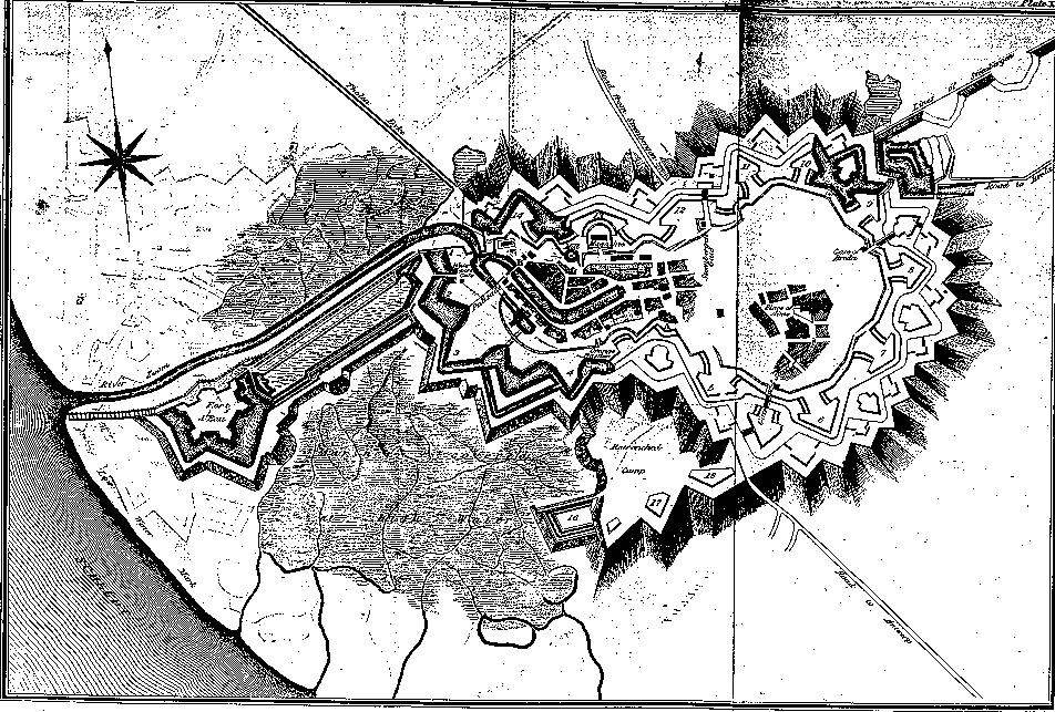 Napoleontische tekening van de verdedigingswerken van Bergen op Zoom. oude tekening zonder auteursrechten